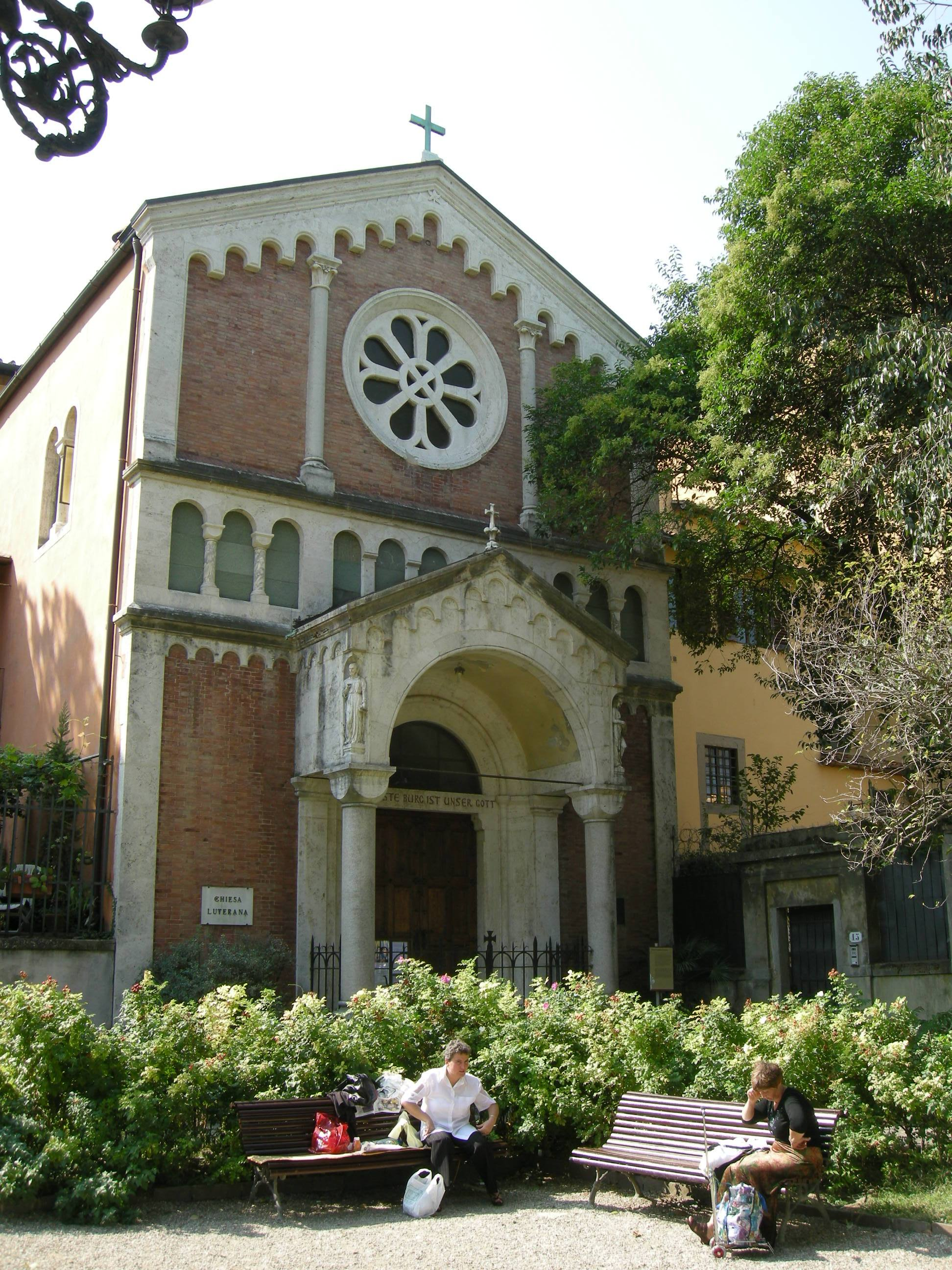 Chiesa protestante di firenze